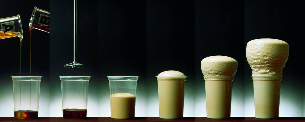 Entstehung eines Polyurethan-Schaumpilzes